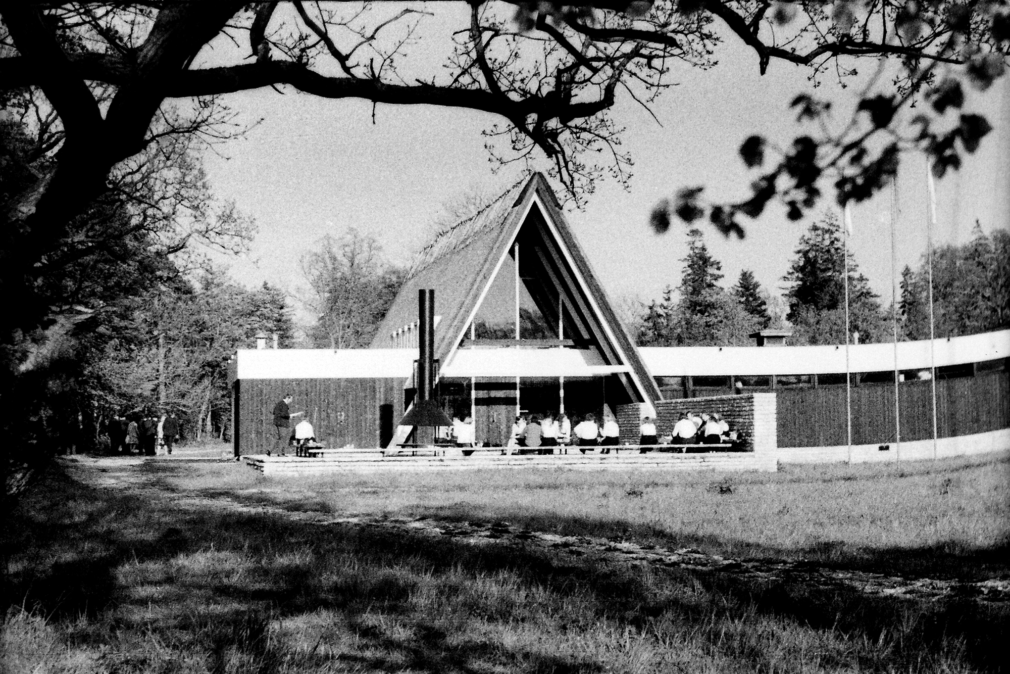 Merepiiga kohviku projekteeris Voldemar Herkel, valmis 1966. aastal.